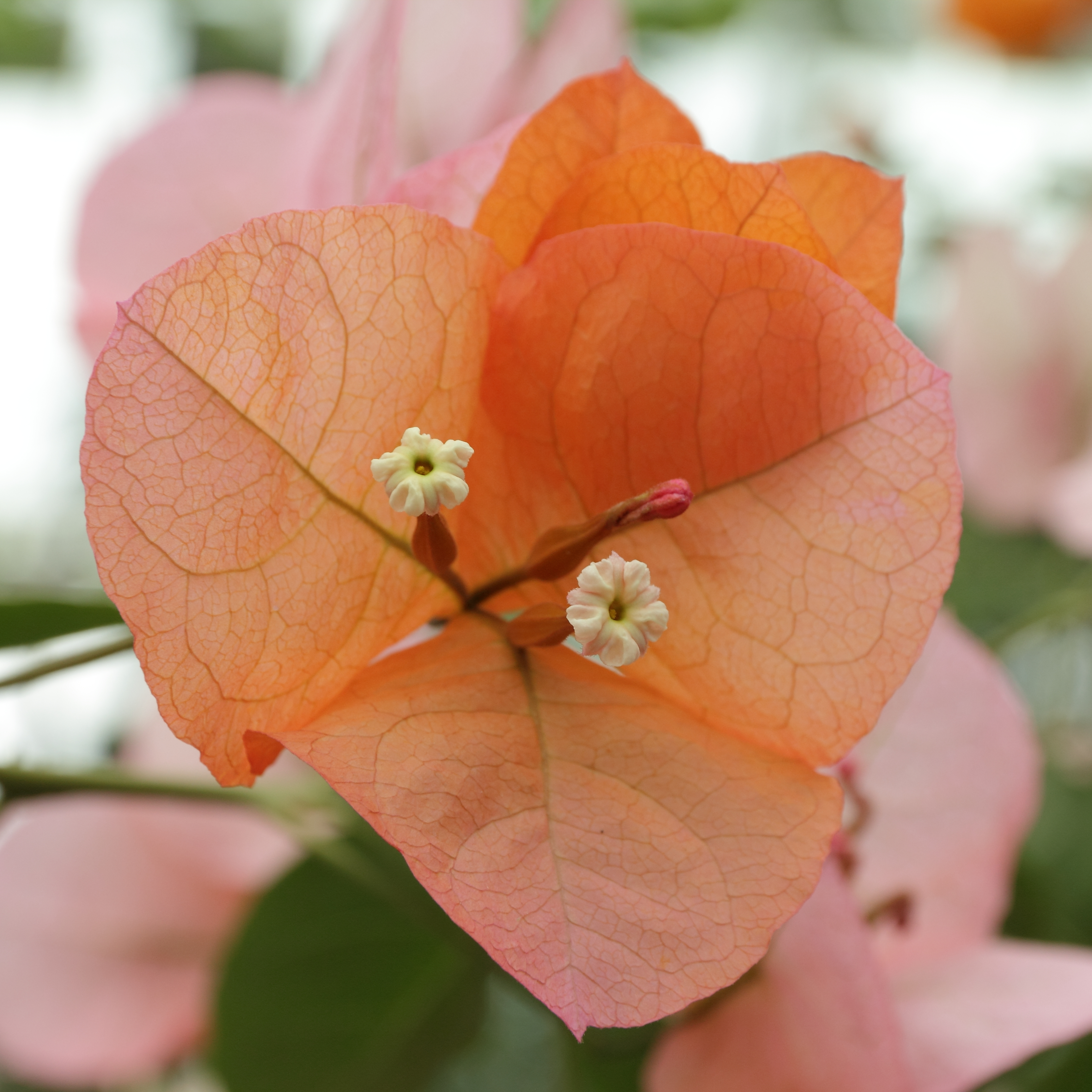 Bougainvillea × buttiana i Bergianska trädgården.